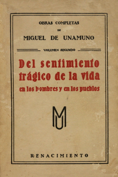 Portada de una edición de "El sentimiento trágico de la vida" de Miguel de Unamuno, Renacimiento.